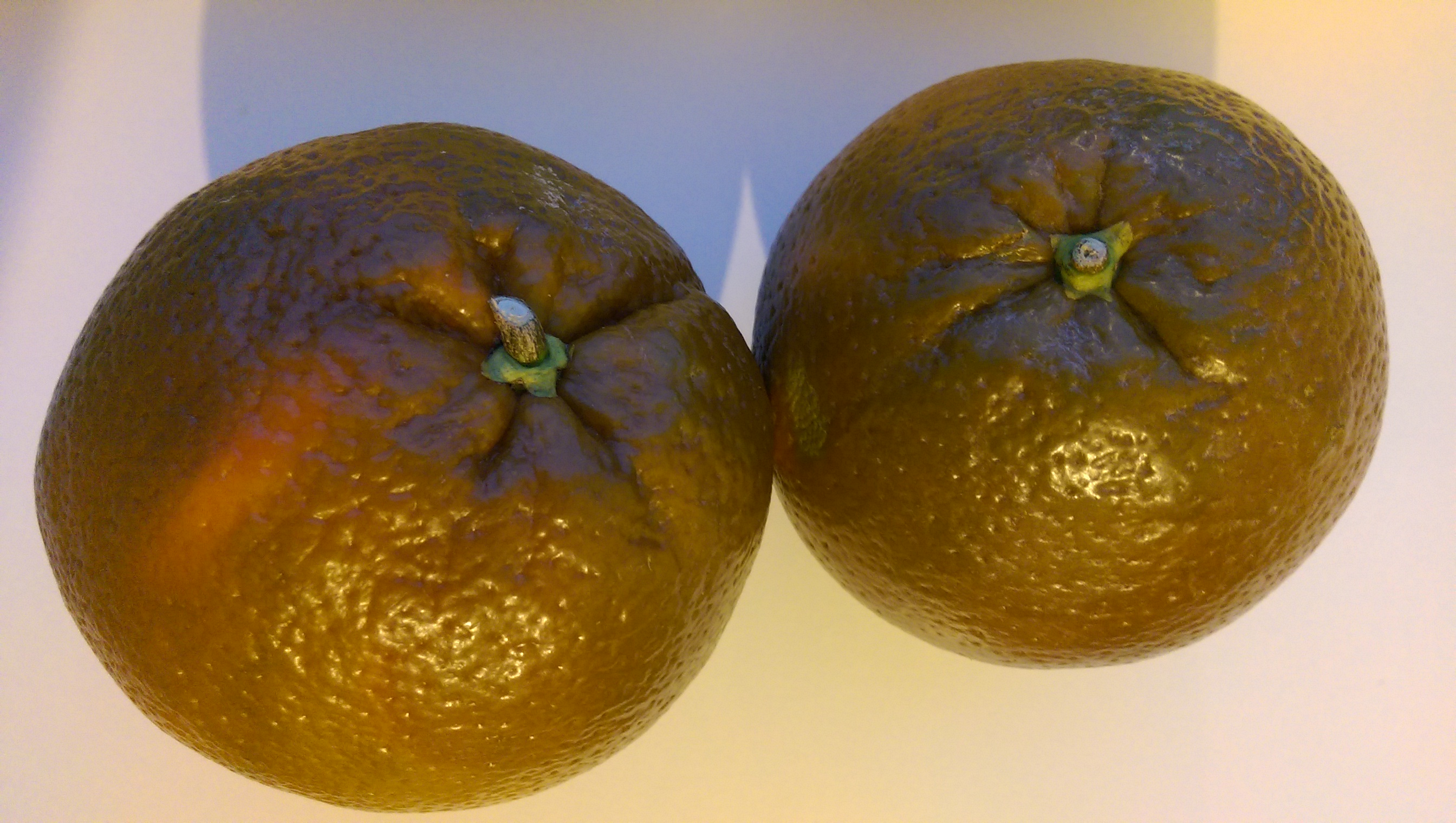 Apelsin Brownie